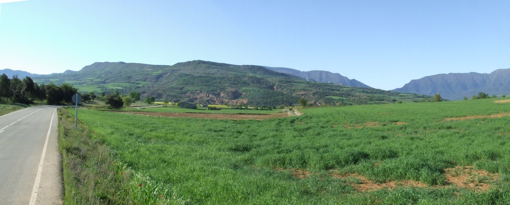 L'antic terme de Sant Serni (Gavet de la Conca, Pallars Jussà)